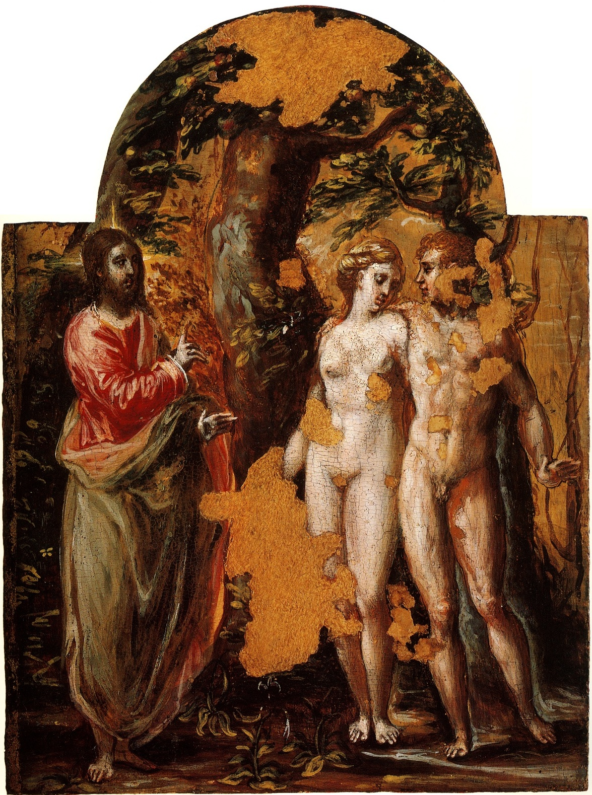 Cacciata di Adamo ed Eva dal Paradiso (Trittico di Modena)